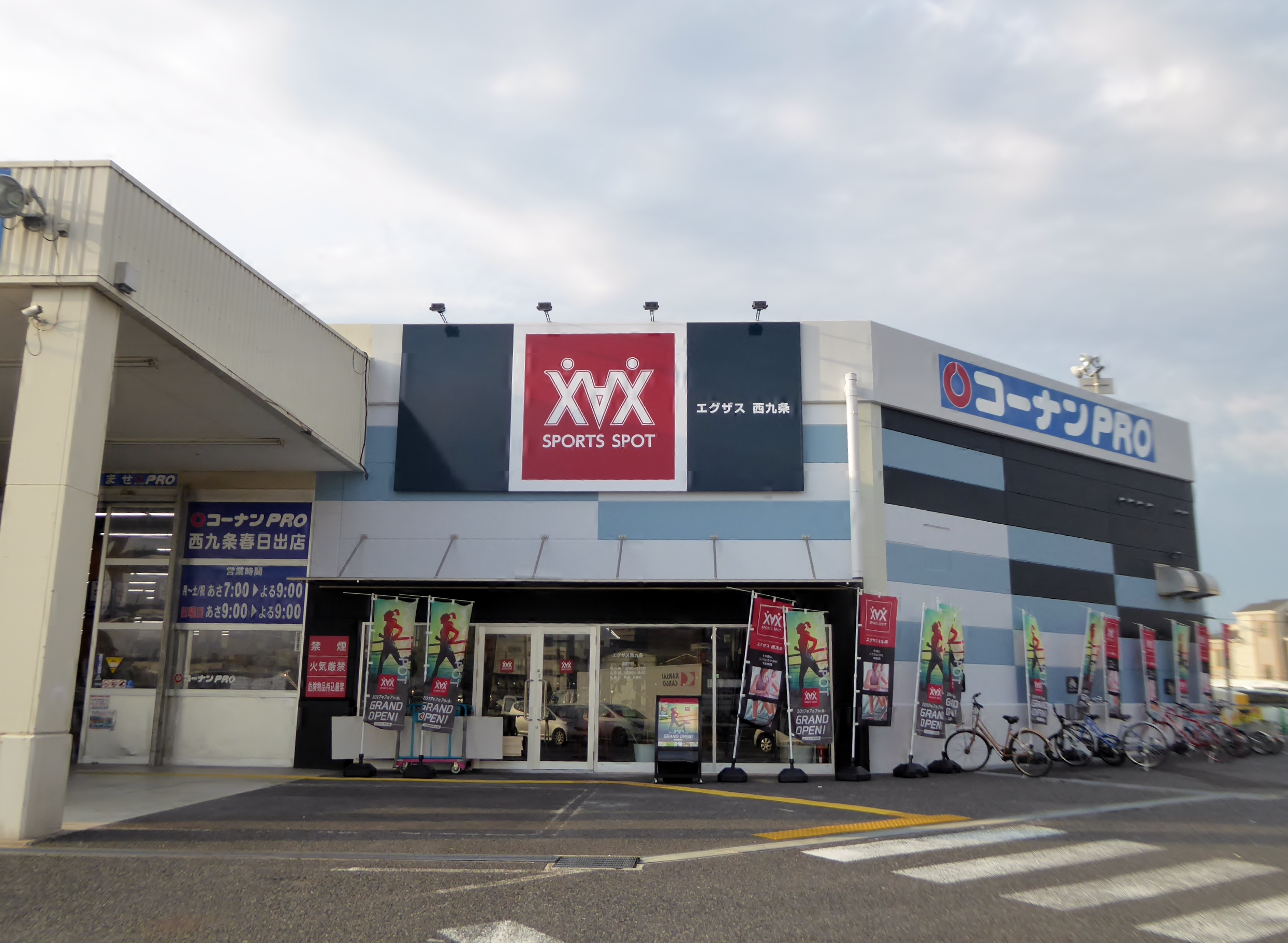 エグザス西九条を撮影。